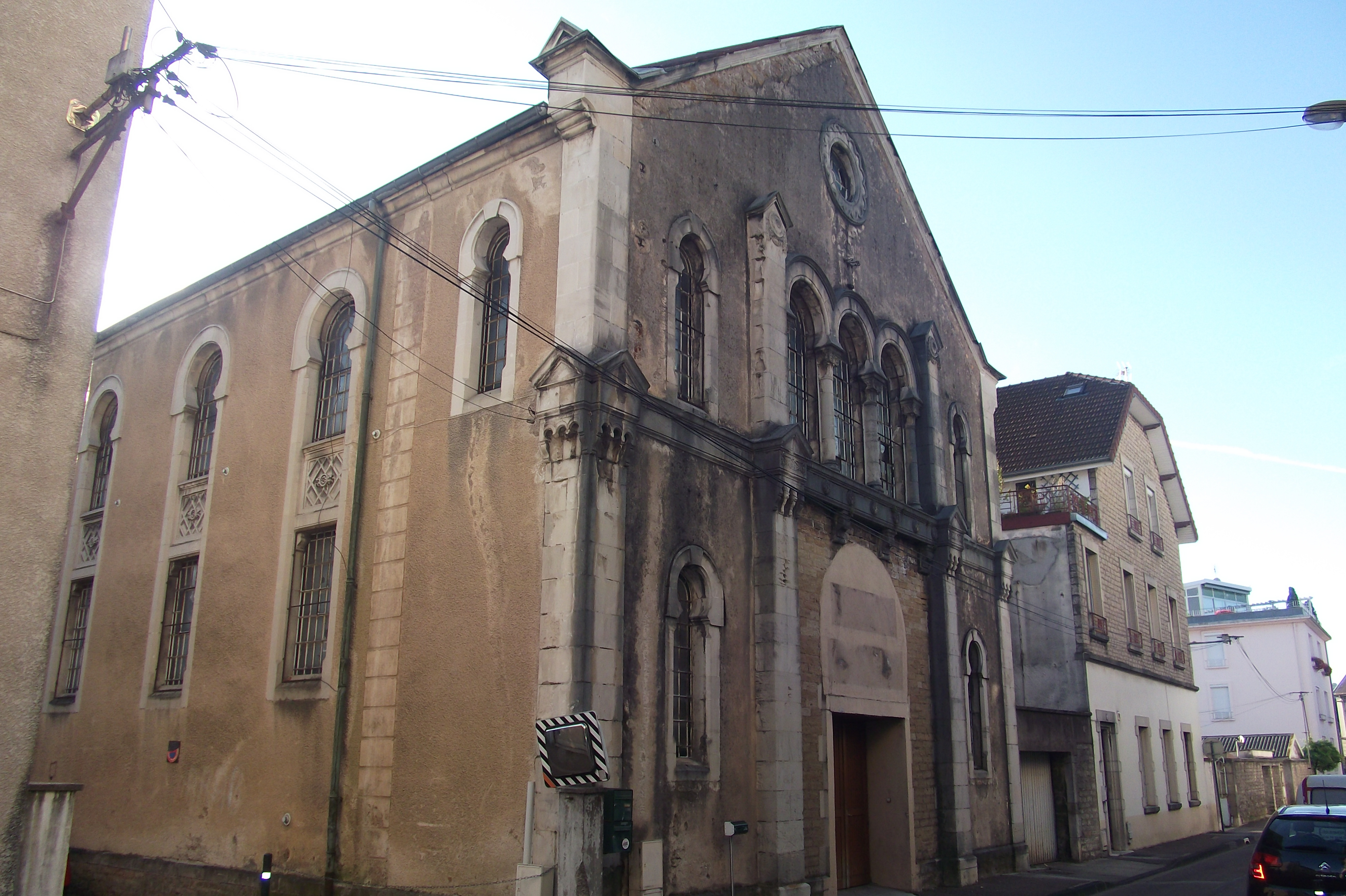 La synagogue de Vesoul (Haute-Saône, Franche-Comté)